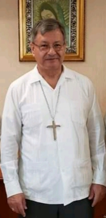 Moseñor Rutilo Muñoz Zamora, en su oficina de la catedral san jose, de la diocesis de coatzacoalcos